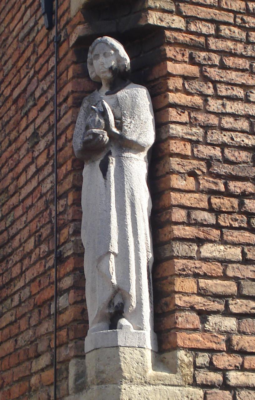 Delft, Oude Delft / Nieuwstraat. Kunstwerk "Vrouw met vlam" van Henk Etienne. The Netherlands. The photographical reproduction of this work is covered under the article 18 of the Dutch copyright law, which states that “it is not an infringement of copyright to reproduce and publish pictures of a work, as meant in article 10, first paragraph, under 6°[1] or of an architectural work as meant in article 10, first paragraph, under 8°[2], which are made to be permanently located in a public place, as long as the work is depicted as it is located in the public space. Where incorporation of a work in a compilation is concerned, not more than a few of the works of the same author may be included”. [1] drawings, paintings, works of architecture and sculpture, lithographs, engravings and the likes [2] drafts, sketches and three-dimensional works relating to architecture, geography, topography or other sciences Note that photographs are not included in Item 6. They are separately listed at Item 9 and are therefore not covered by FOP. See COM:CRT/Netherlands#Freedom of panorama for more information. .